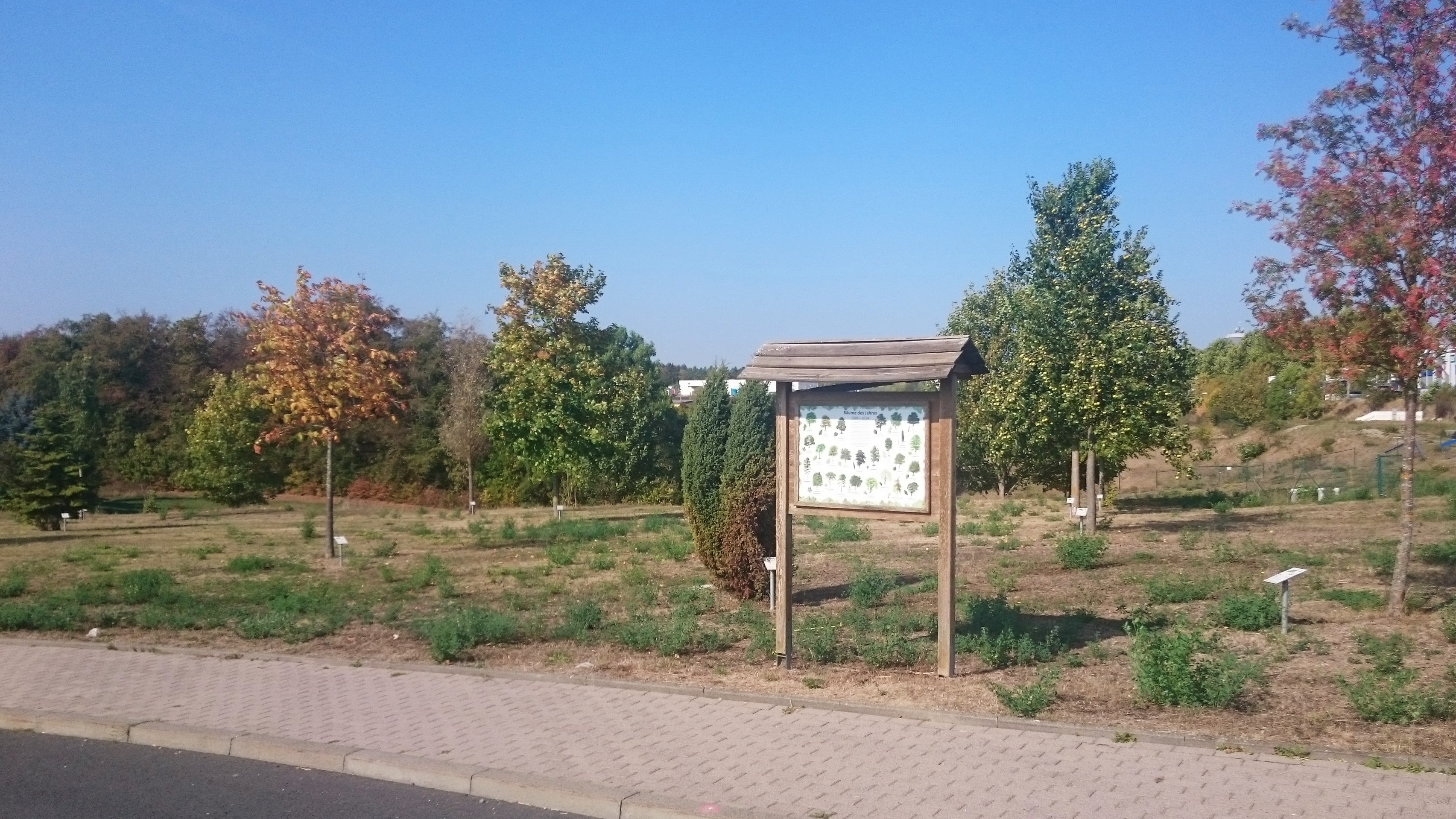 Arboretum in Meiningen, gelegen im Stadtteil Dreißigacker-Süd.